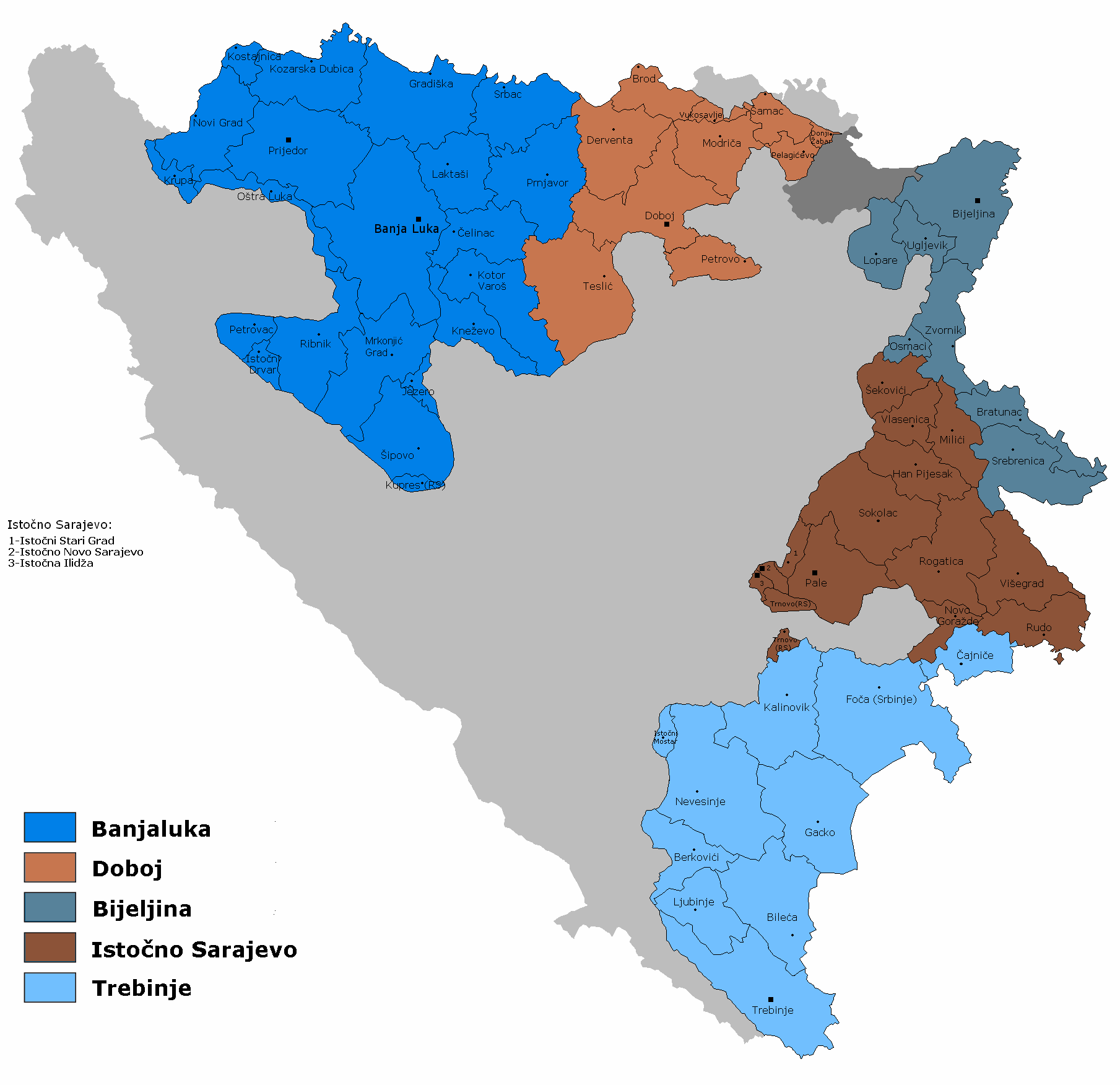 Окружни судови Републике Српске